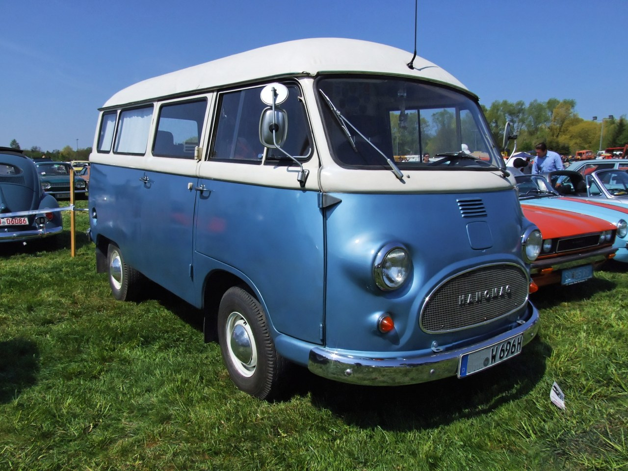 Quelle: selbst fotografiert, 04/2007 Fotograf: Späth Chr.